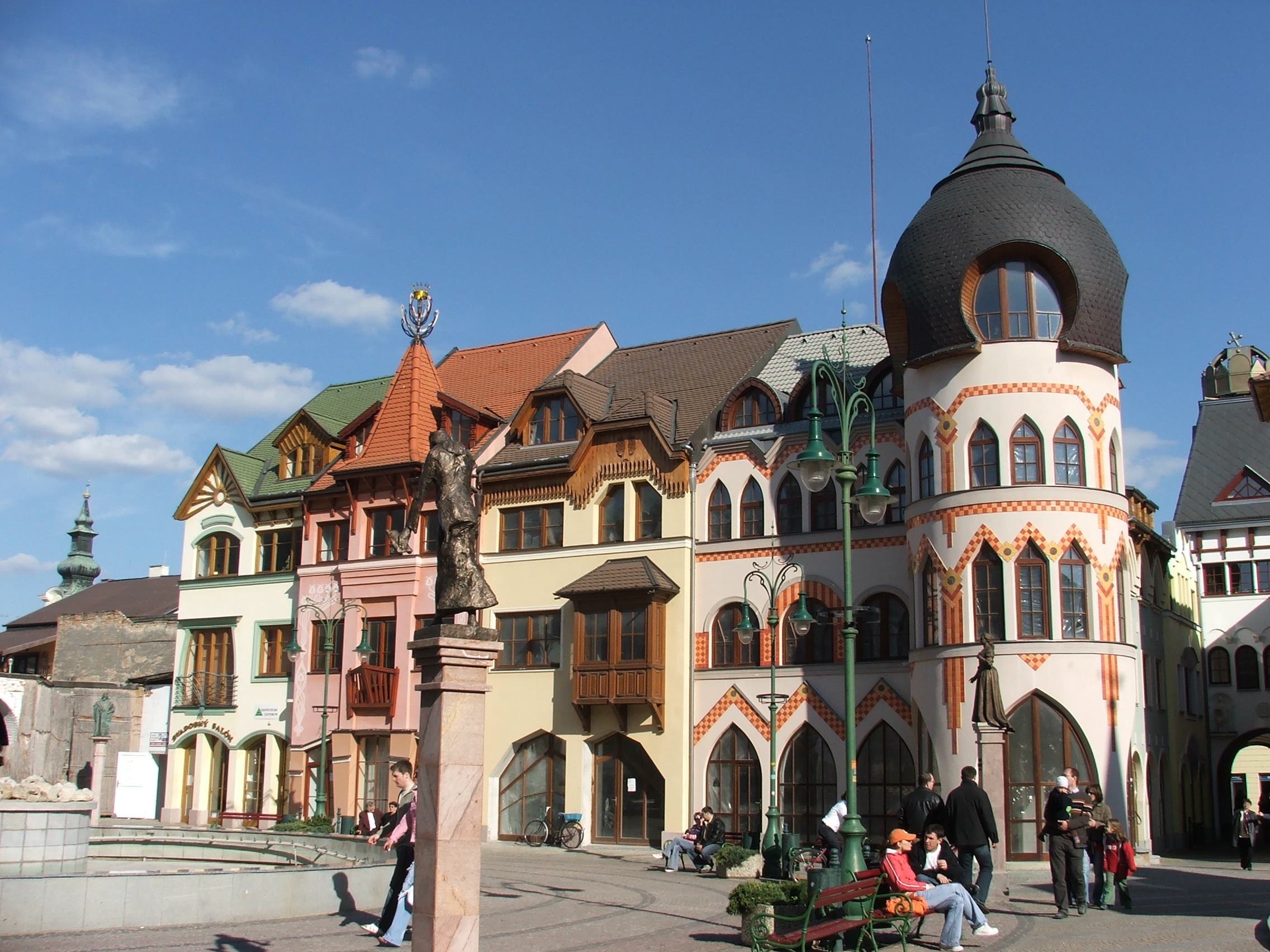 Révkomáromi Európa-udvar